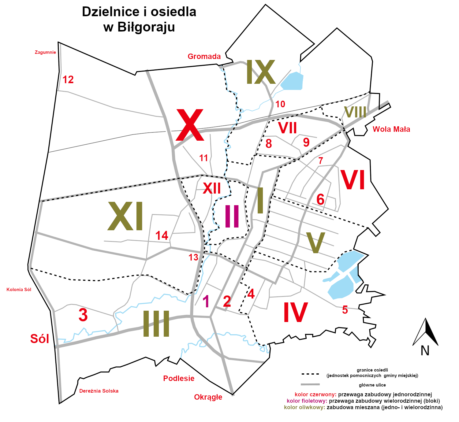 Plan osiedli - jednostek pomocniczych gminy - w Biłgoraju (numery I-XII), oraz wybranych osiedli mieszkaniowych nie mających statusu administracyjnego (numery 1-14).